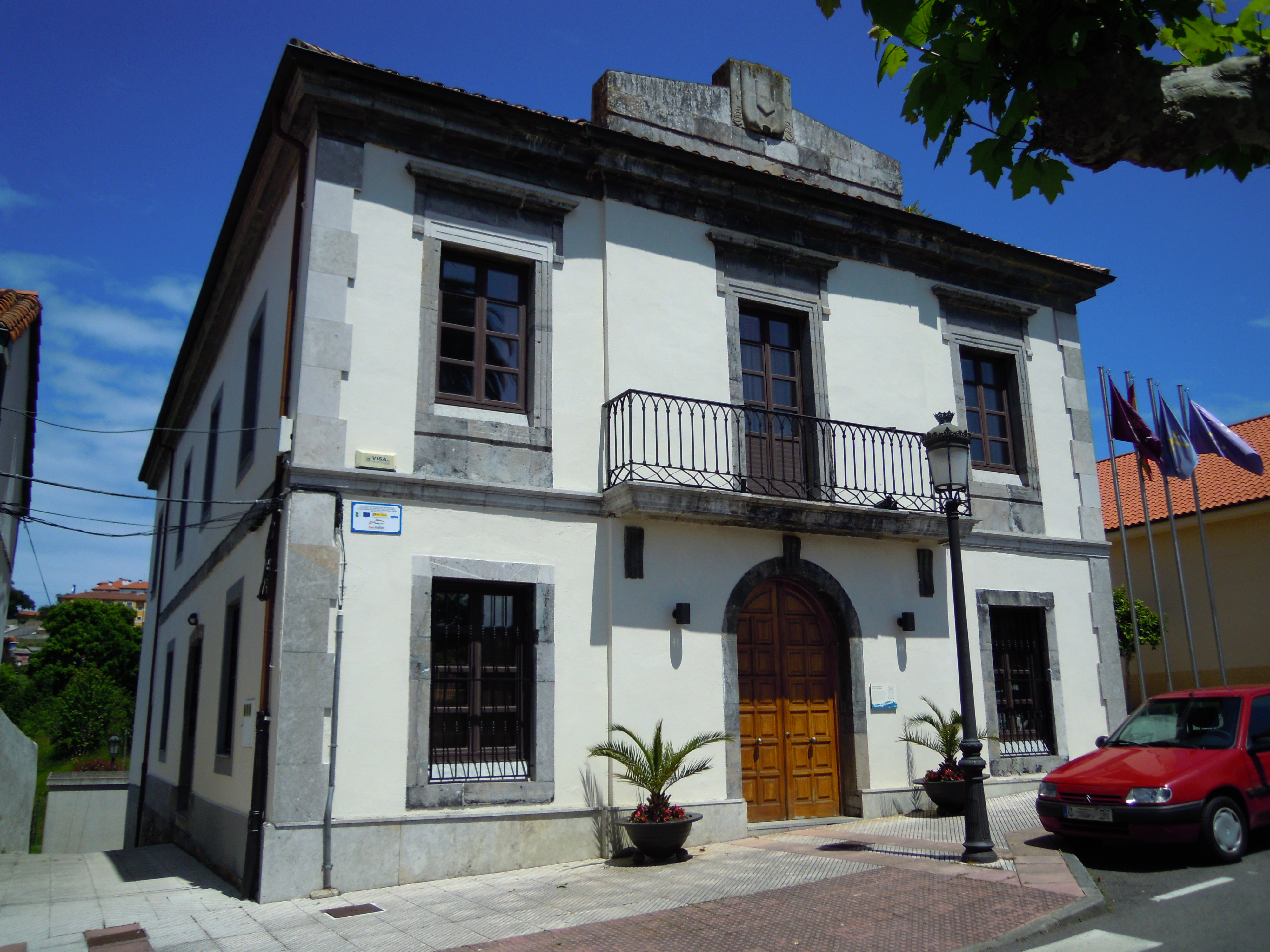 Casa del conceyu de Sotu'l Barcu